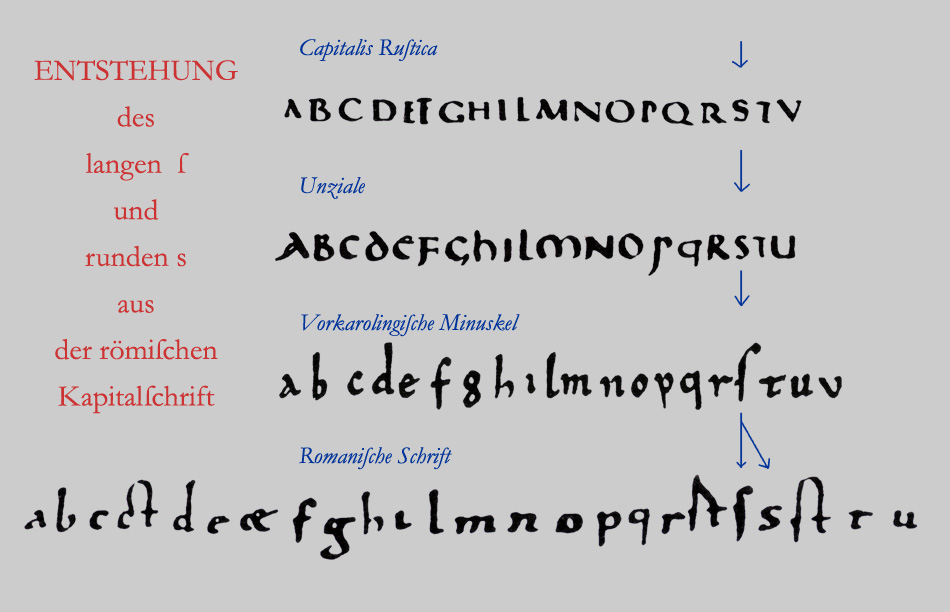 Entwicklung des langen s aus der römischen Majuskelschrift.